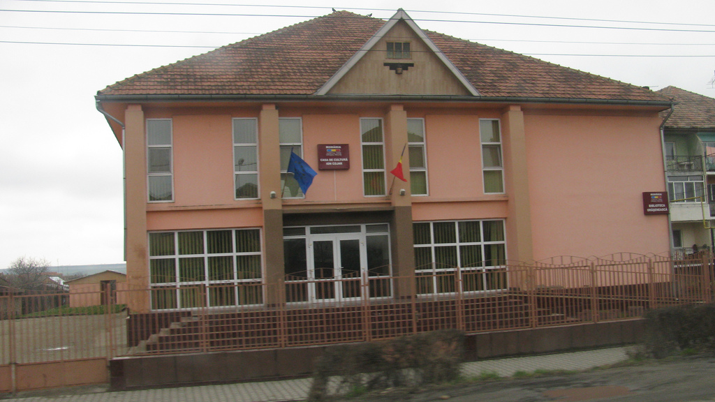 Orasul Recaş - Casa de Cultura si Biblioteca oraseneasca